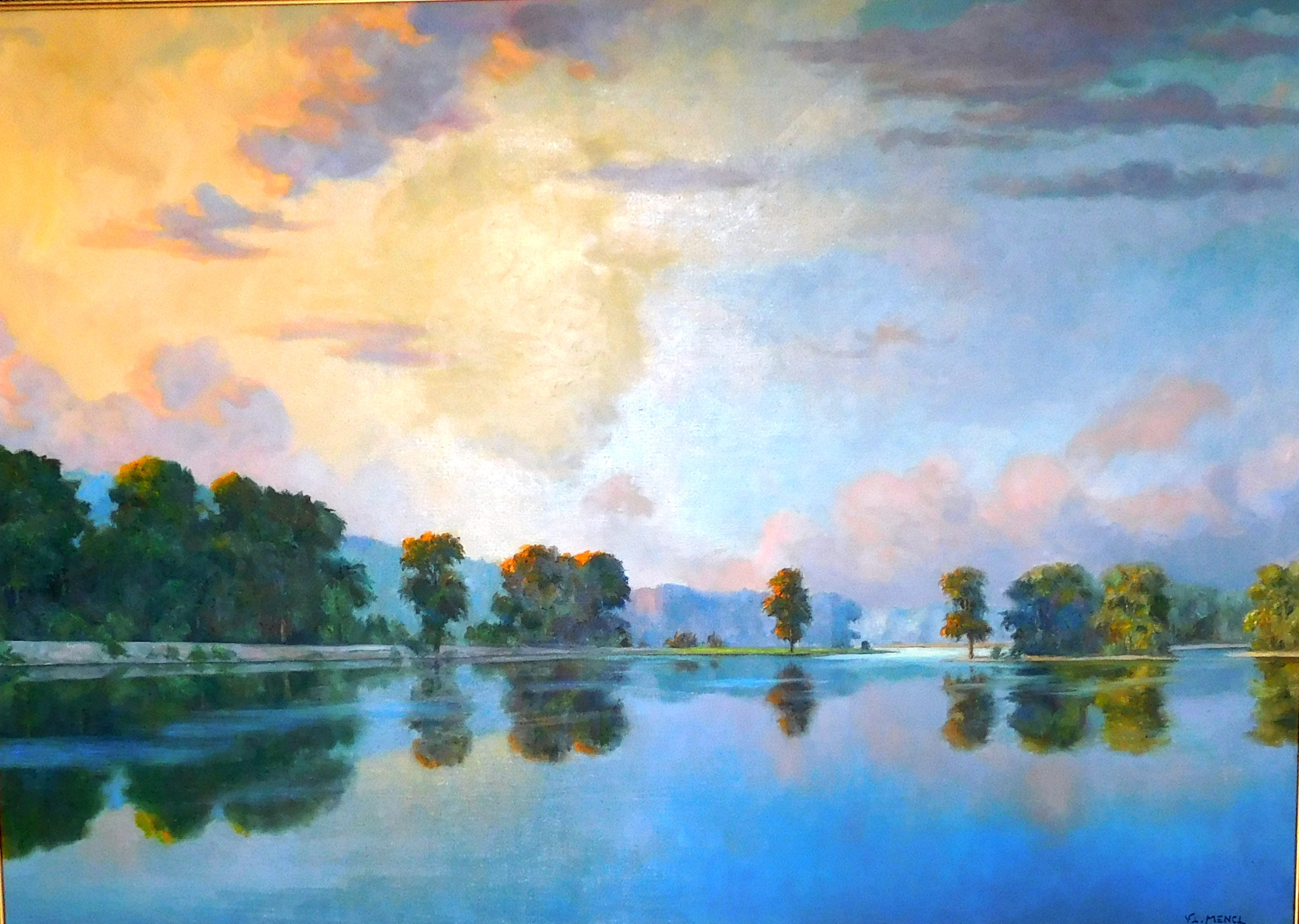 Vladimír Mencl dílo 12